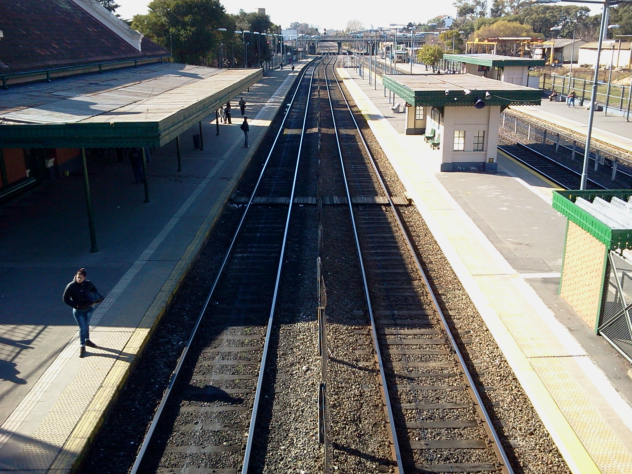 Andenes 2